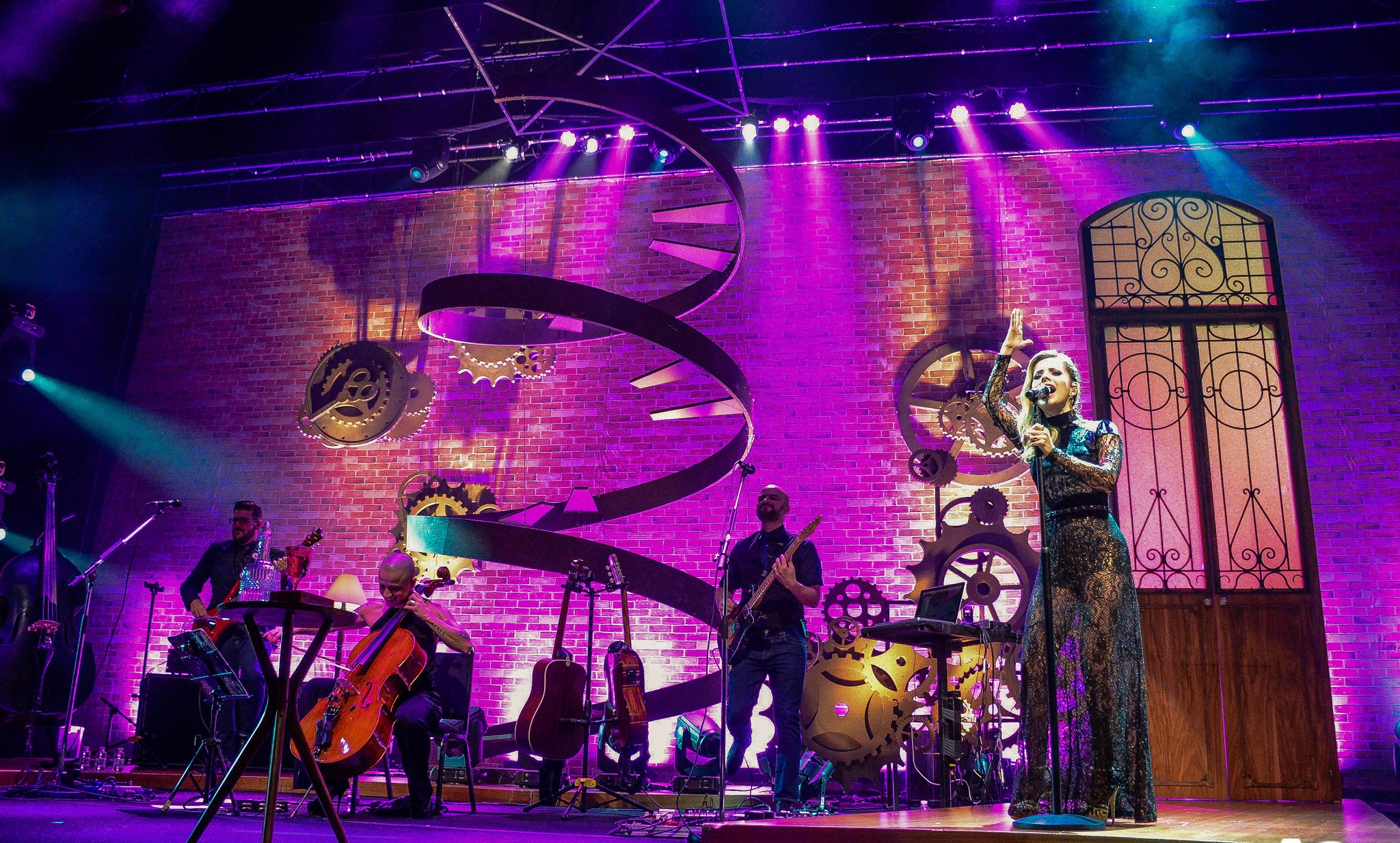 Sandy se apresentando com a turnê Meu Canto na casa de shows Tom Brasil, em São Paulo - 2 de junho de 2017.